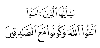 imagen de una aleya del Corán